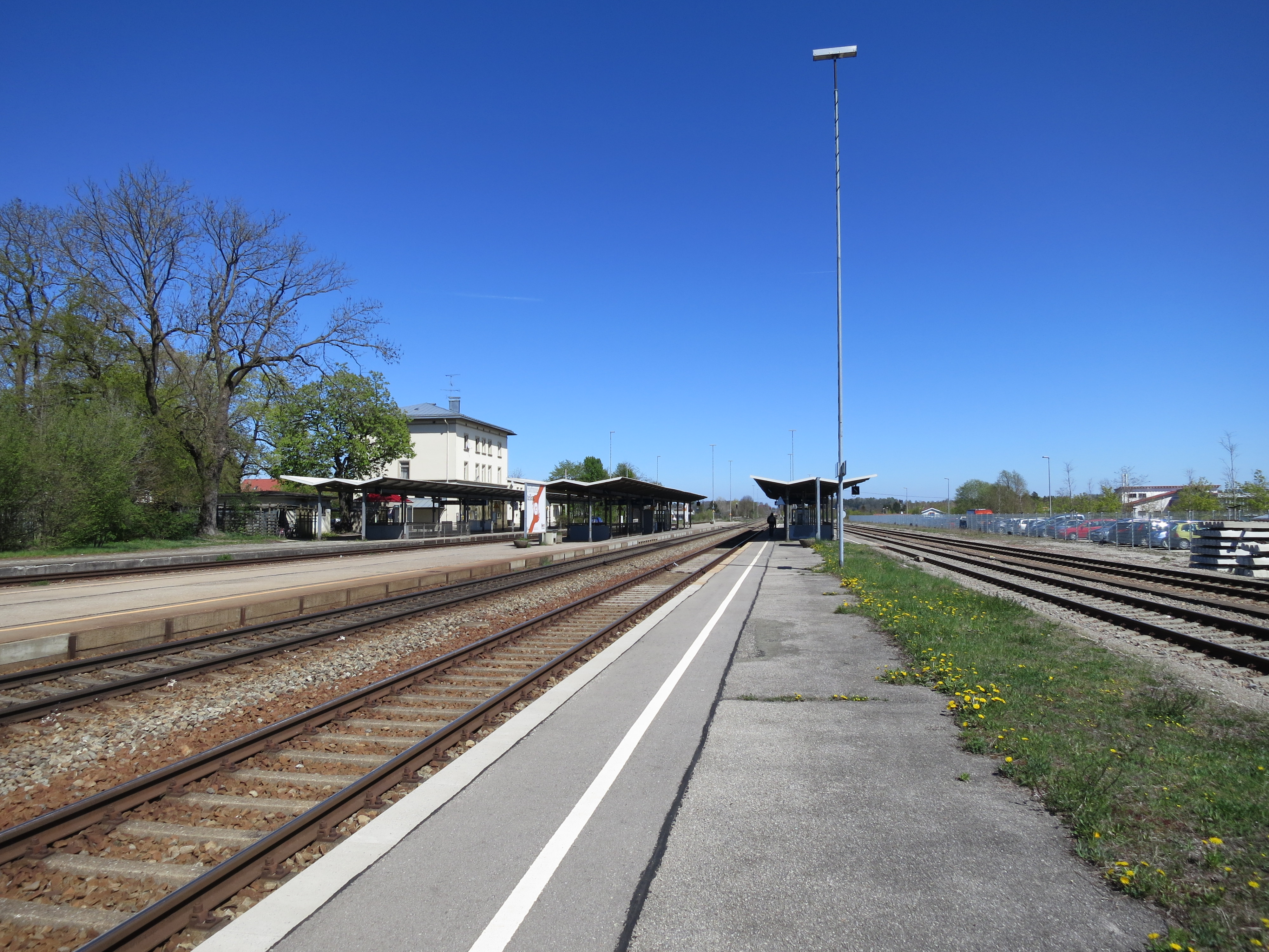 Bahnsteige des Bahnhofs Kaufering, links das Empfangsgebäude von der Gleisseite